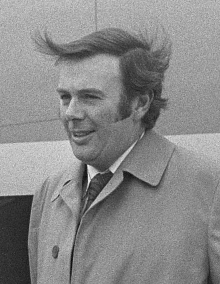 John Farquharson Smith, Baron Kirkhill. Air Anglia opent dienst tussen Aberdeen (Schotland) en Amsterdam, burgemeester Aberdeen (...) op Schiphol met eerste lijnvlucht